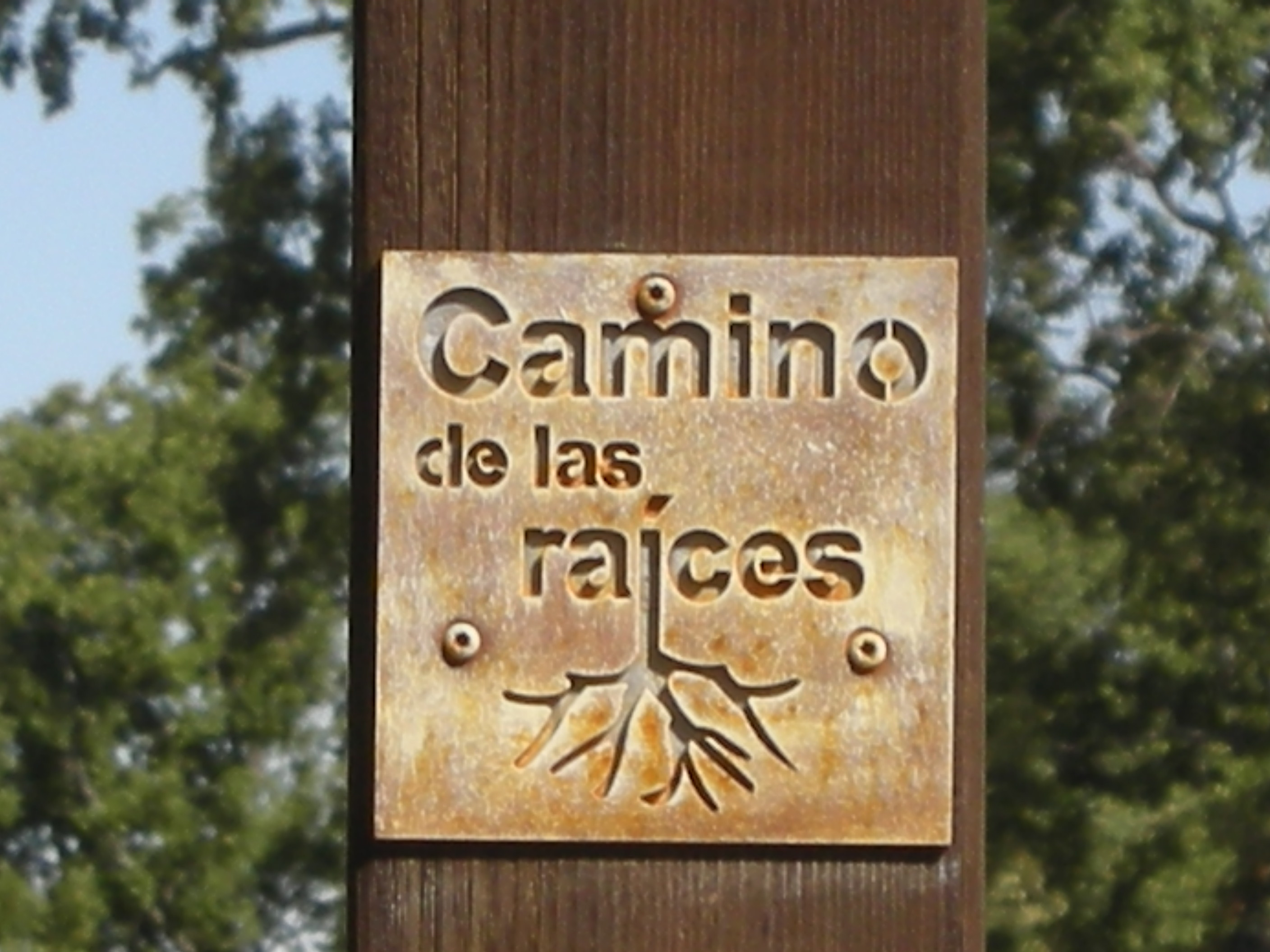 Balisage de sentiers autour de la commune de Sotoserrano en Espagne